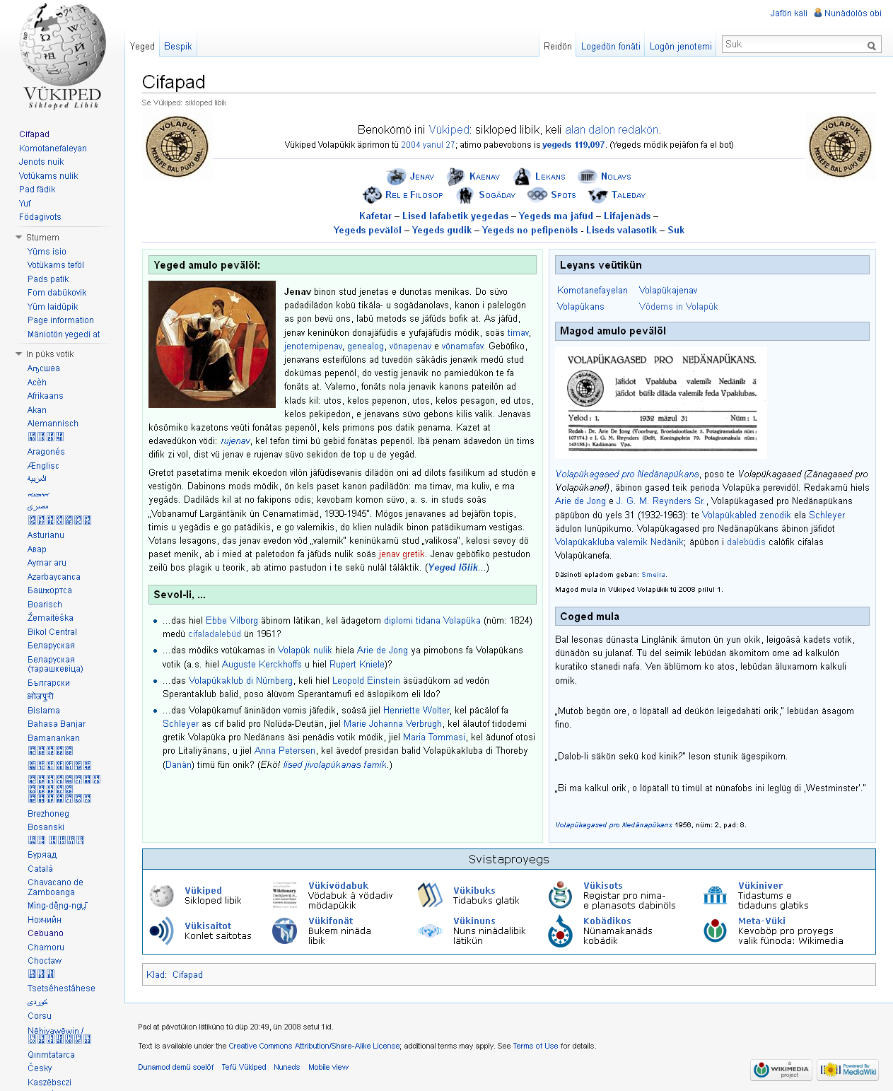 Screenshot - Hlavní strana Volapuk Wikipedie ze dne 7. května 2013